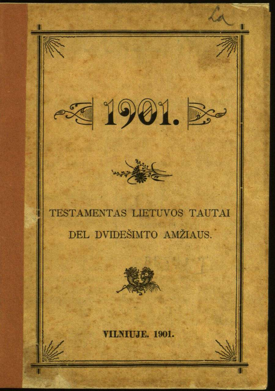 Cover of 16-page booklet 1901. Testamentas Lietuvos tautai del dvidešimto amžiaus